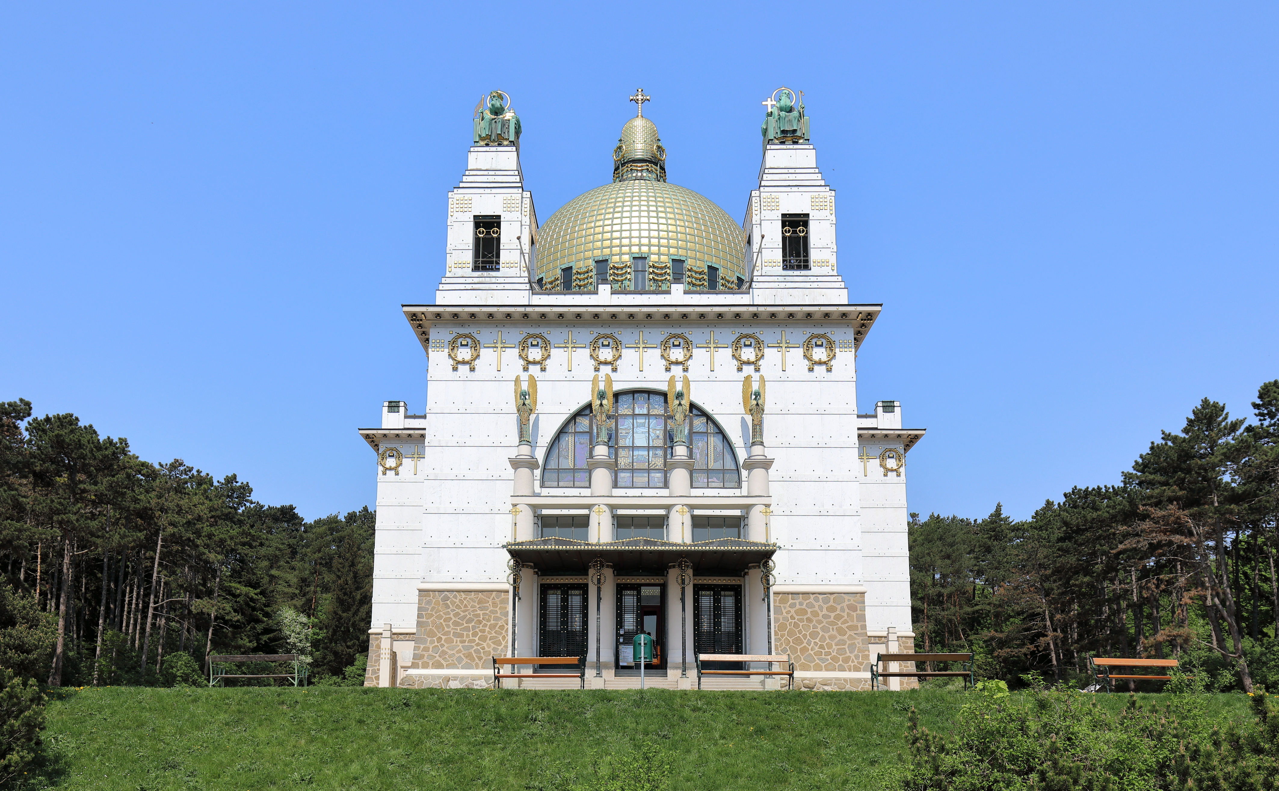 Hauptfassade bzw. Südansicht der Kirche am Steinhof, auch Leopoldskirche bezeichnet, auf dem Gelände des „Sozialmedizinischen Zentrums Baumgartner Höhe“ im 14. Wiener Gemeindebezirk Penzing und das Leopold-Steiner-Denkmal.Die Kirche wurde von 1904 bis 1907 über dem traditionellen Grundriss eines griechischen Kreuzes nach Plänen des Architekten Otto Wagner als Anstaltskirche errichtet. Sie ist der bedeutendste Sakralbau der Wiener Moderne in Wien.